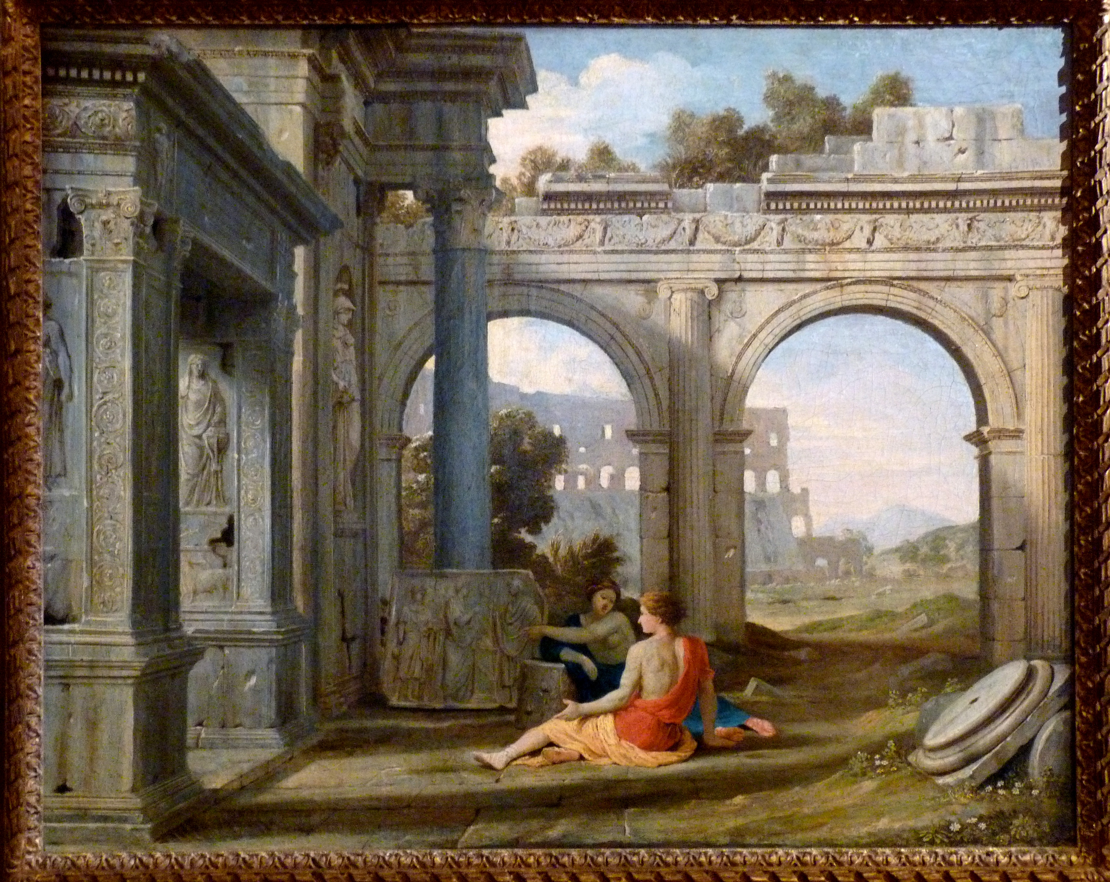 de Jacques lemaire (1601-1659), collection particulière de Georges de Lastic (1927-1988) lors de l'exposition Le cabinet d'un amateur, n°24, au musée de la chasse et de la nature, Paris (décembre 2009-mars 2010).